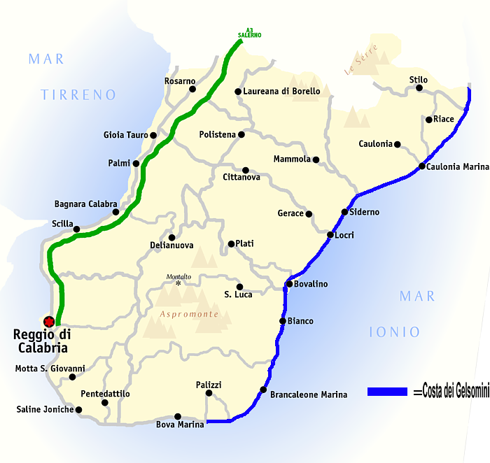 Mapa de la Locride, Calabria